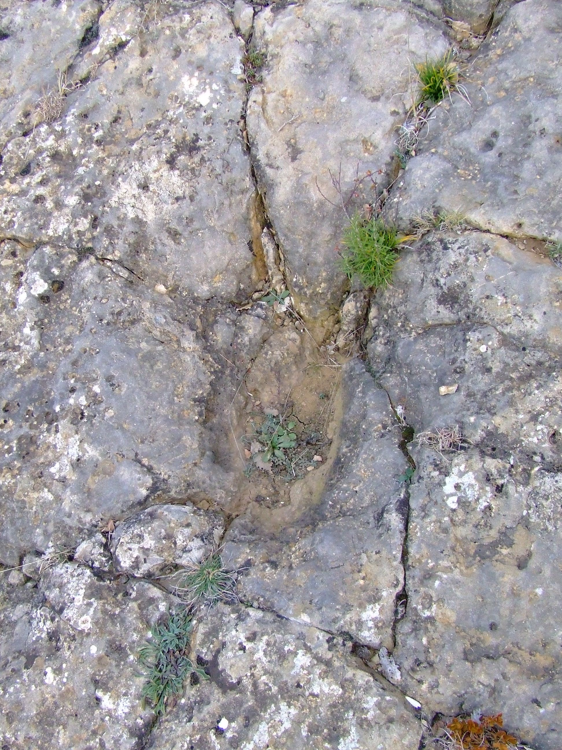 Detall de les petjades de la Posa (Isona, Isona i Conca Dellà, Pallars Jussà)